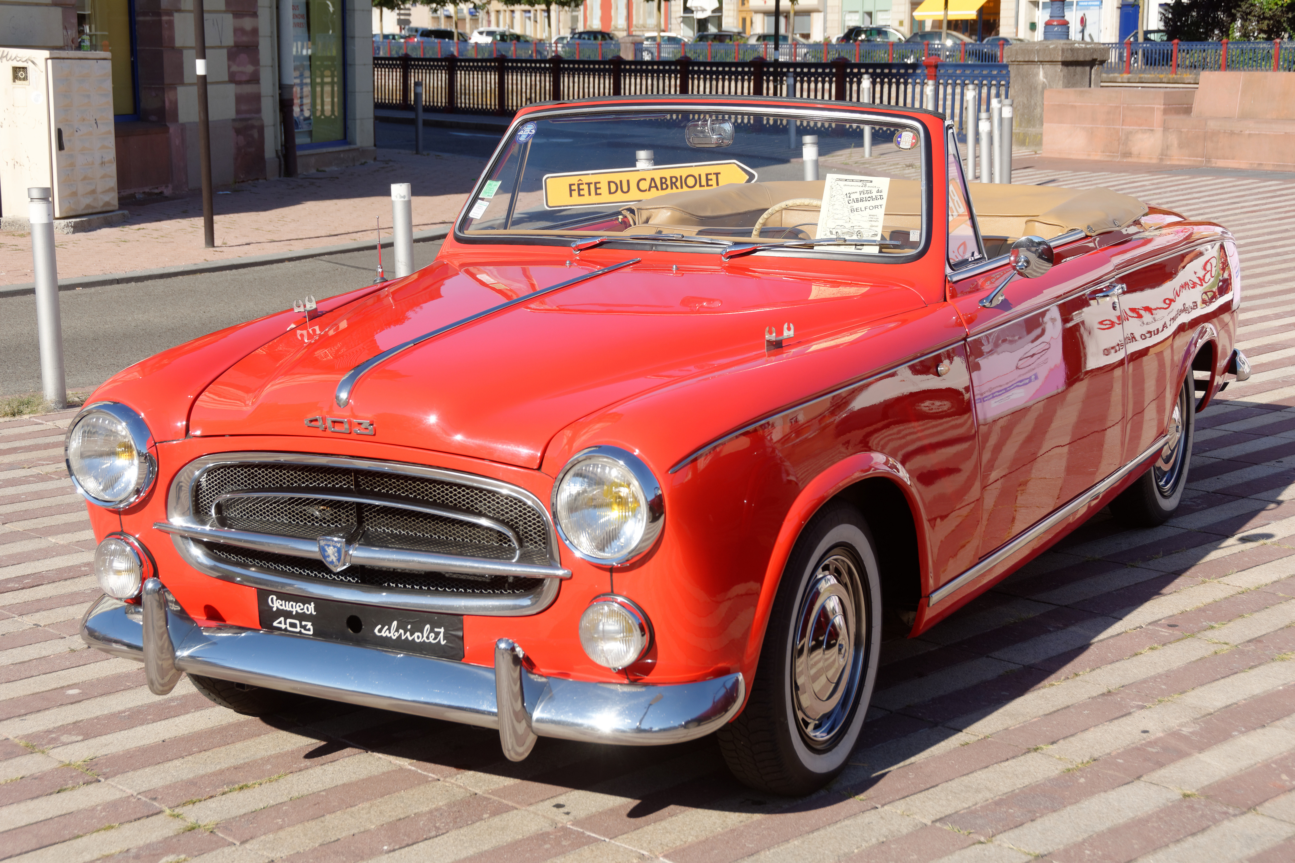 Exposition de cabriolets sur la place Corbis, à Belfort.